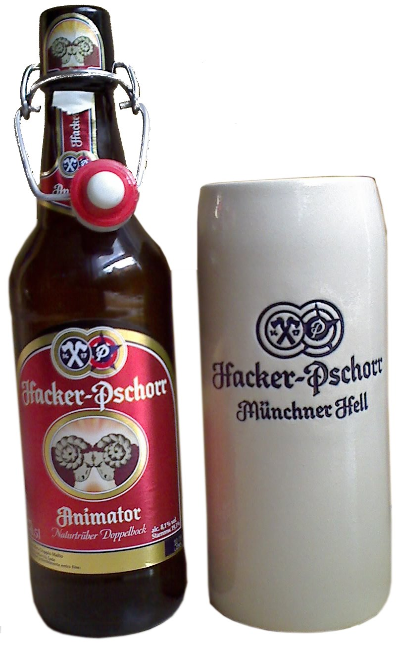 Hacker Pschorr Animator ( Maibock ) inklusiv Bierglas